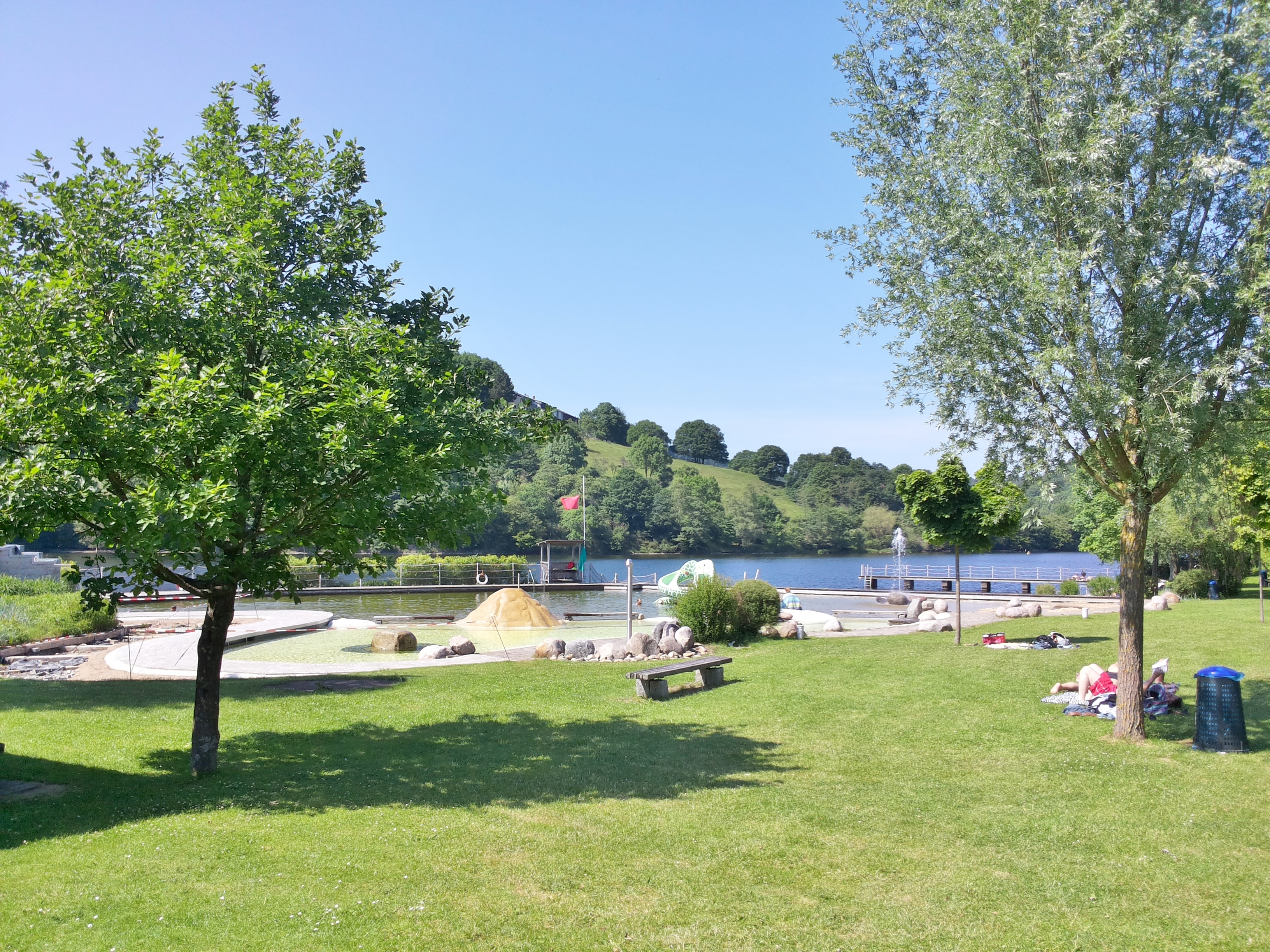 Naturfreibad im Obersee bei Einruhr 2017